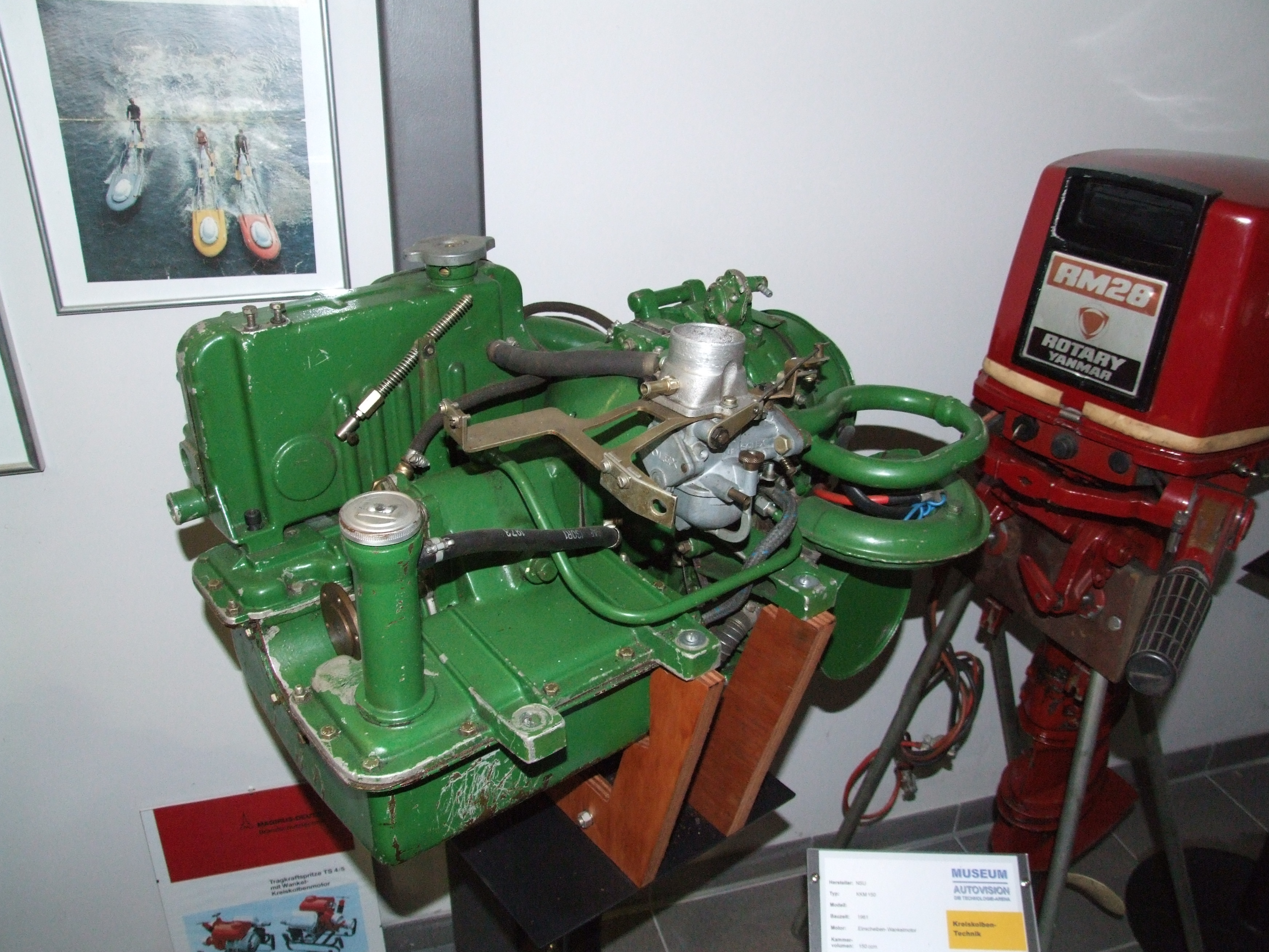 Motor NSU KKM 150, (KKM = Kreiskolbenmotor), Einscheiben-Wankelmotor, 150 ccm, 18,5 PS, Baujahr 1961, erster Wankelmotor mit Wendegetriebe, eingesetzt als Flautenschieber für Segelboote; Museum Autovision, Altlußheim, Deutschland; Wankel engine of NSU, 18,5 HP